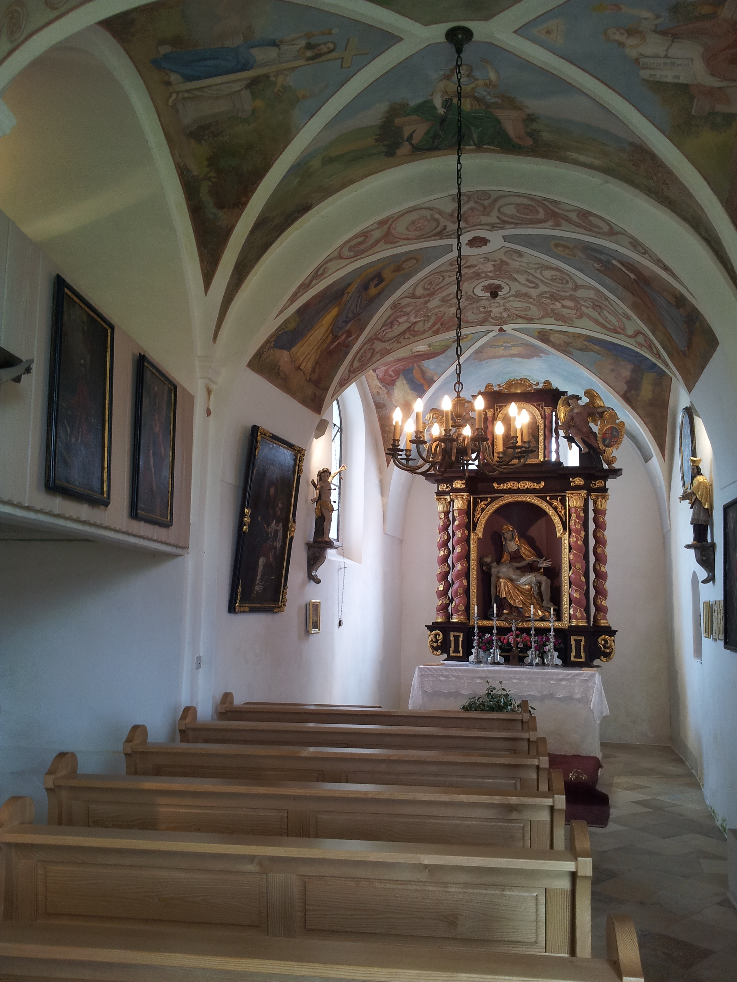 Innenraum